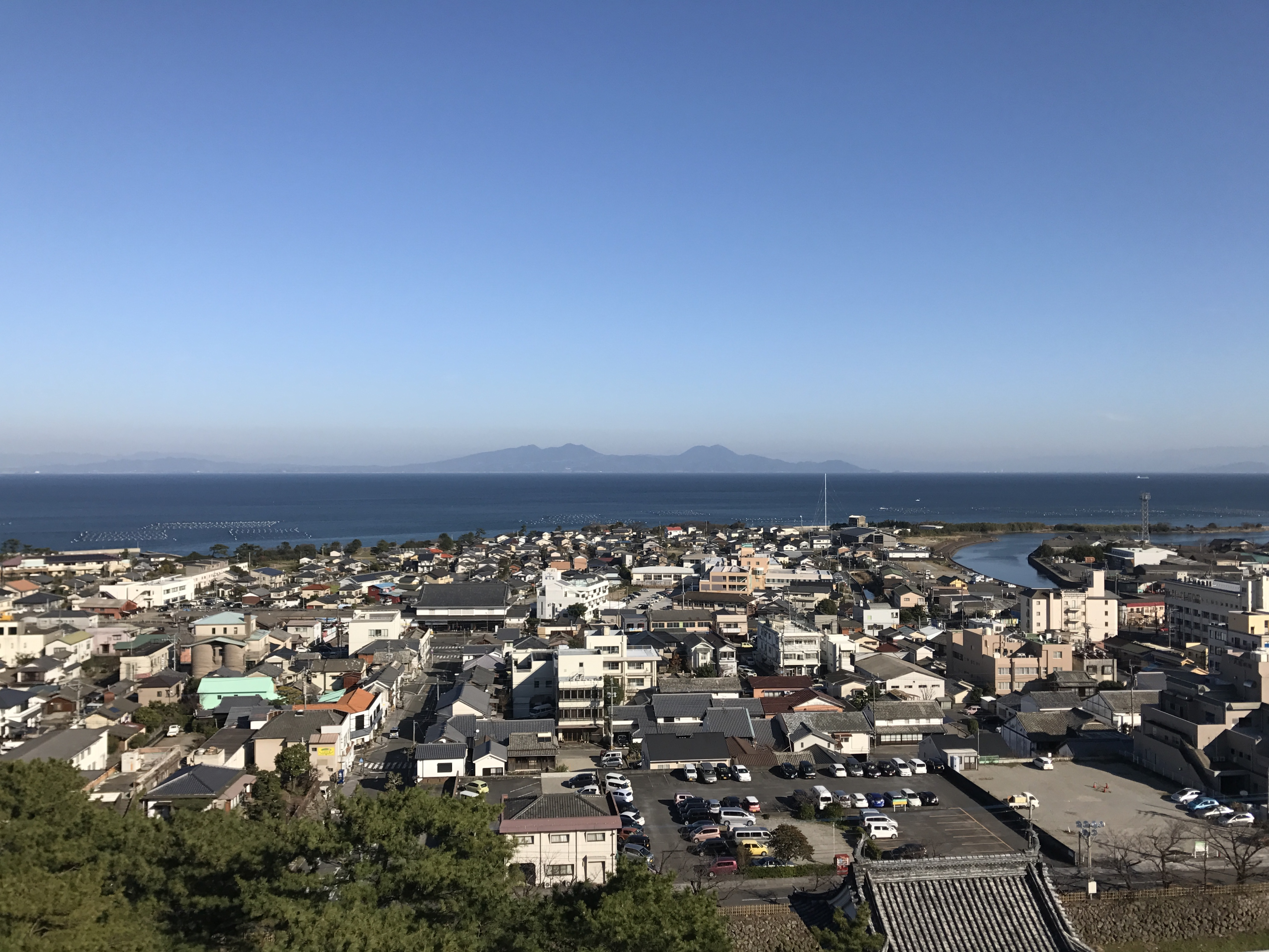 島原城の天守閣より望む金峰山方面